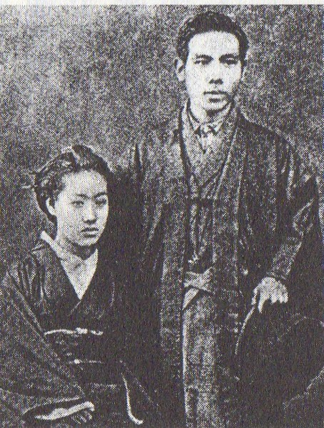 新潟教会時代の成瀬仁蔵と満寿枝